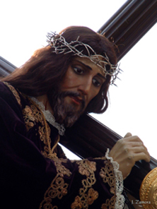 Nuestro Padre Jesus Nazareno de Sorbas, Almería